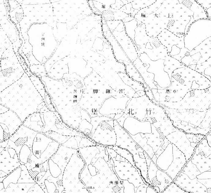 臺灣堡圖－桃園市觀音區富源周圍截圖